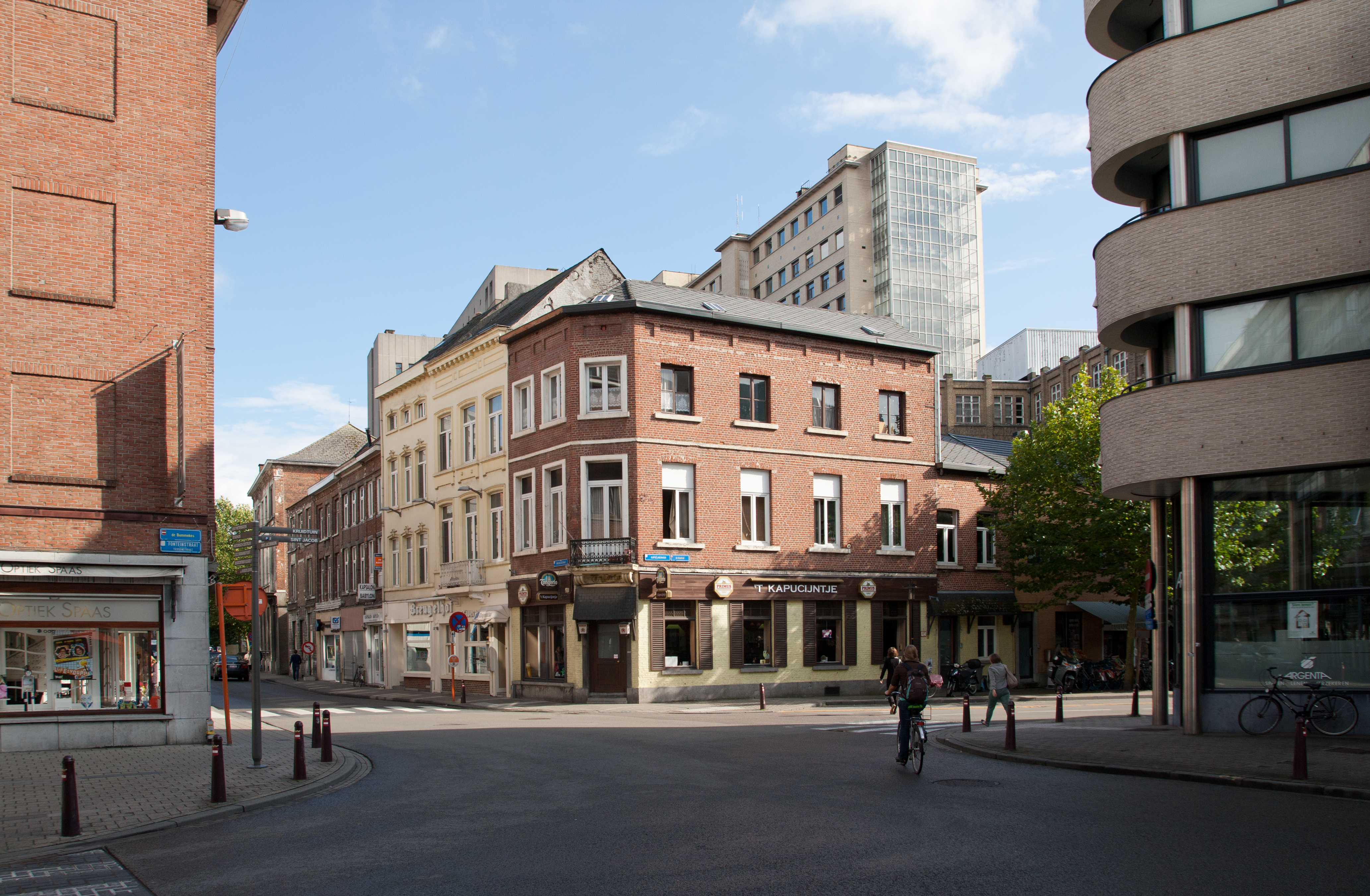 Brusselsestraat 91, Leuven